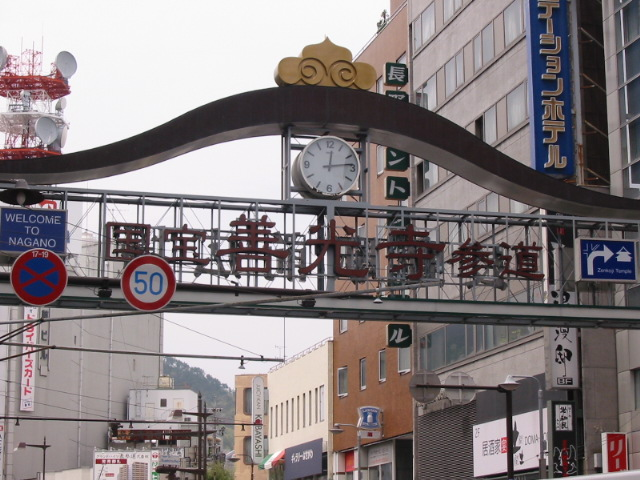 国宝善光寺参道アーチ